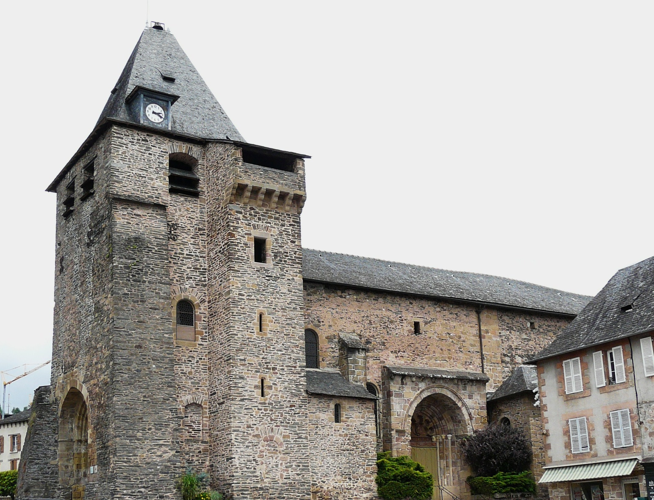 L'église Saint-Jean Baptiste, Allassac, Corrèze, France Object location45° 15′ 27″ N, 1° 28′ 33″ E